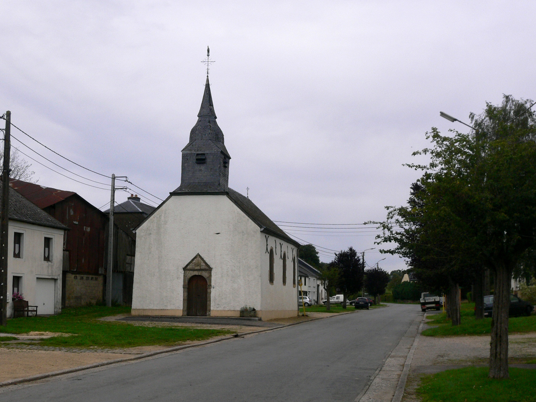 Eglise de Martué, Florenville